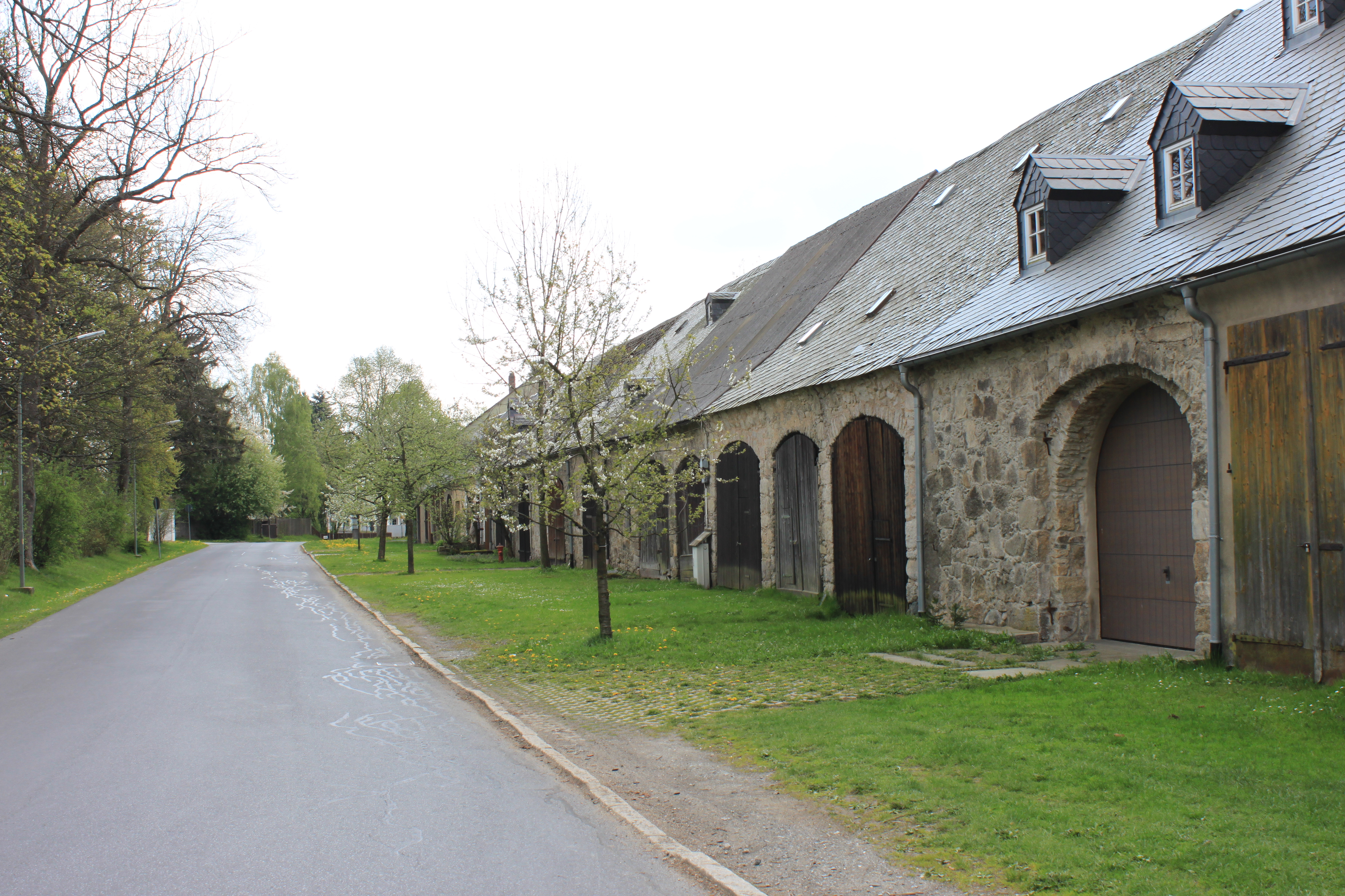 Weißenstadt; Am Ehrenhain; Reihe einfacher Scheunen mit Schieferdächern, um 1840/50